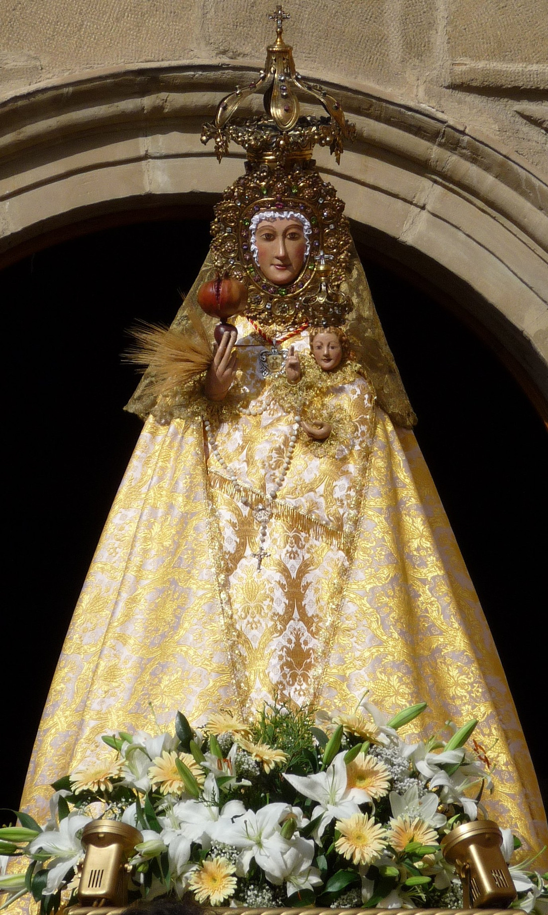 Virgen de la Vega de Haro en la puerta de la basílica, previo a la ofrenda de flores en los jardines de la vega.